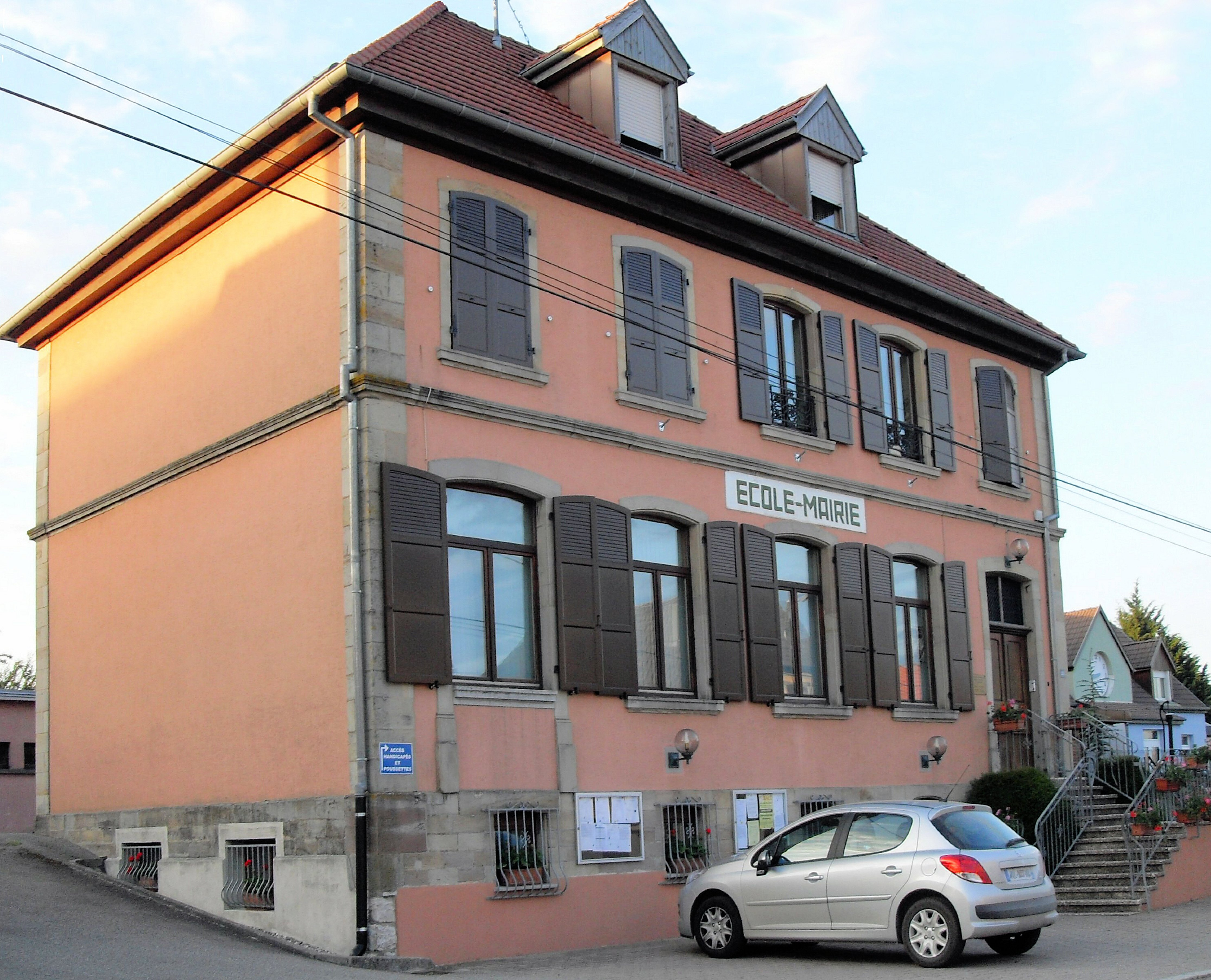 L'école-mairie de Buethwiller